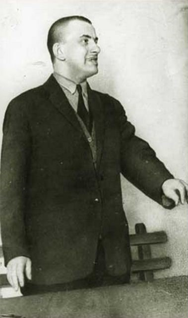 Маяковский в Деловом клубе, Свердловск